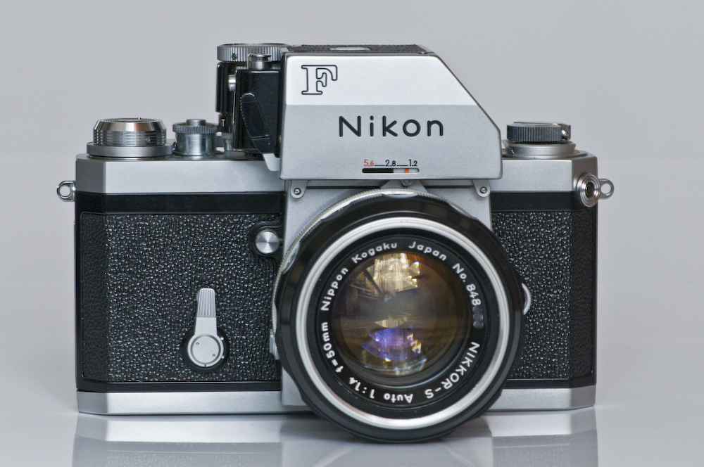 Nikon F Kamera mit Photomic FTn, Baujahr 1970. Ausgestattet mit Nikkor 1,4/50mm